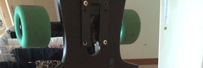 내 보드임